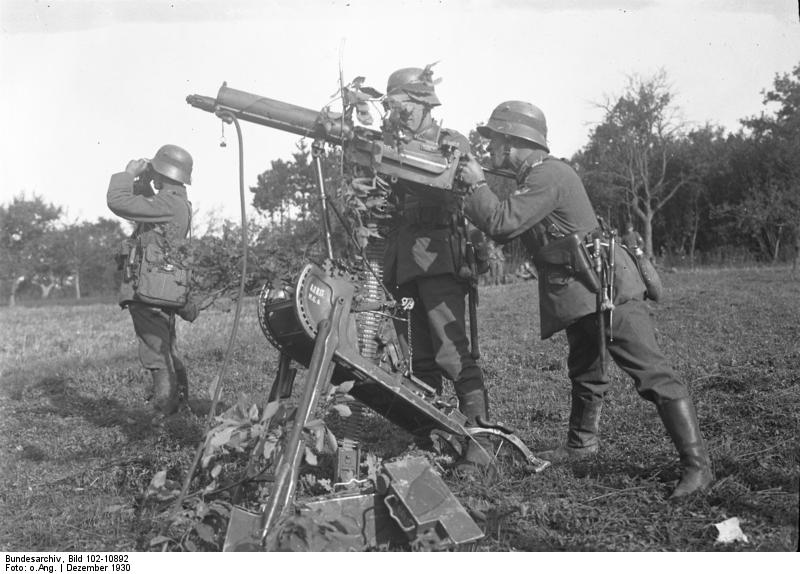 10 Jahre deutsche Reichswehr! Die Waffen unserer Reichswehr, denen sie sich laut Versailler Friedensvertrag bedienen darf. Leichte M.-G. getarnt mit Feldlaub gegen Fliegersicht in Feuerstellung.